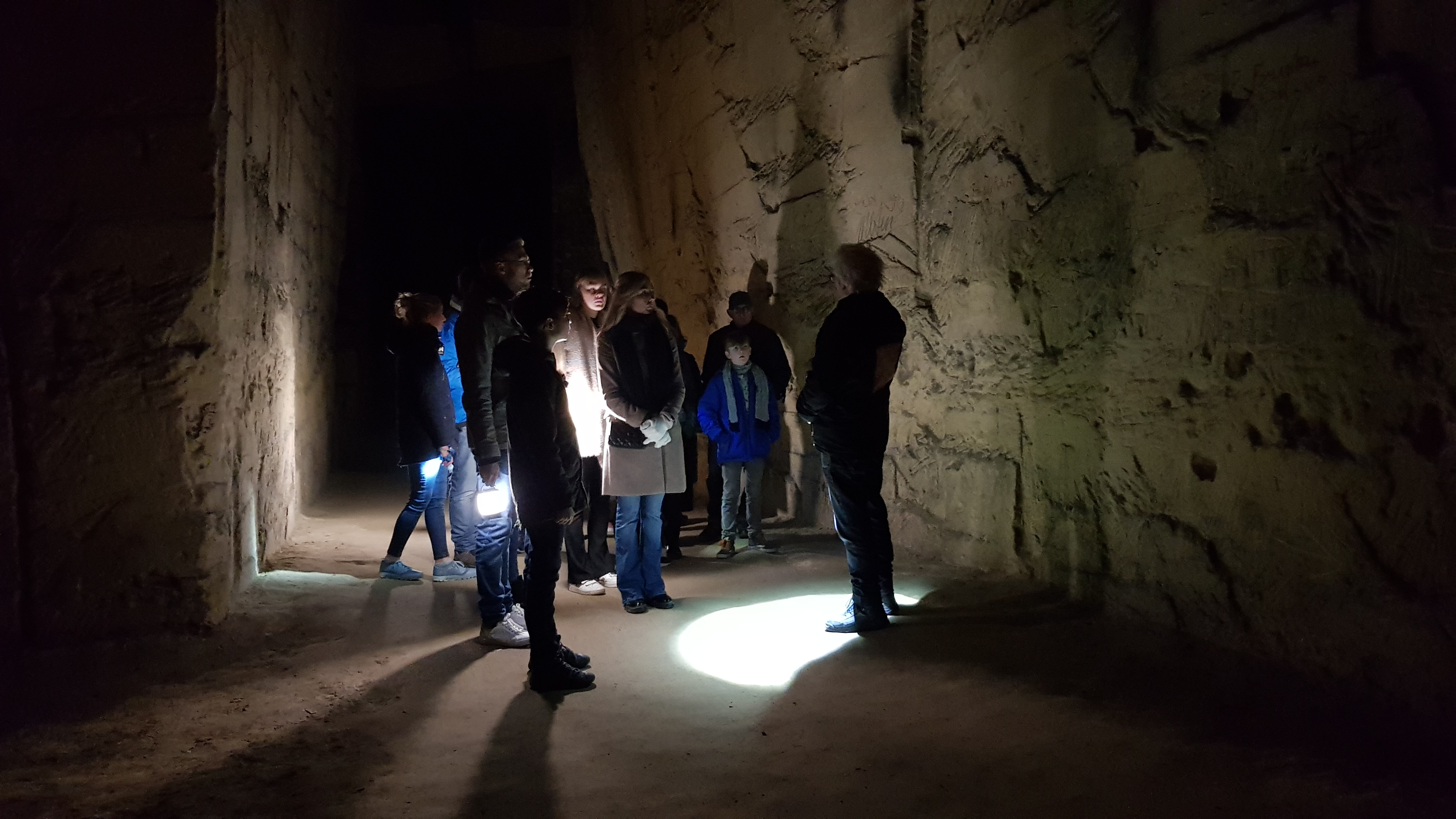 Gangenstelsel Zonneberg in de Sint-Pietersberg, Maastricht, Nederland